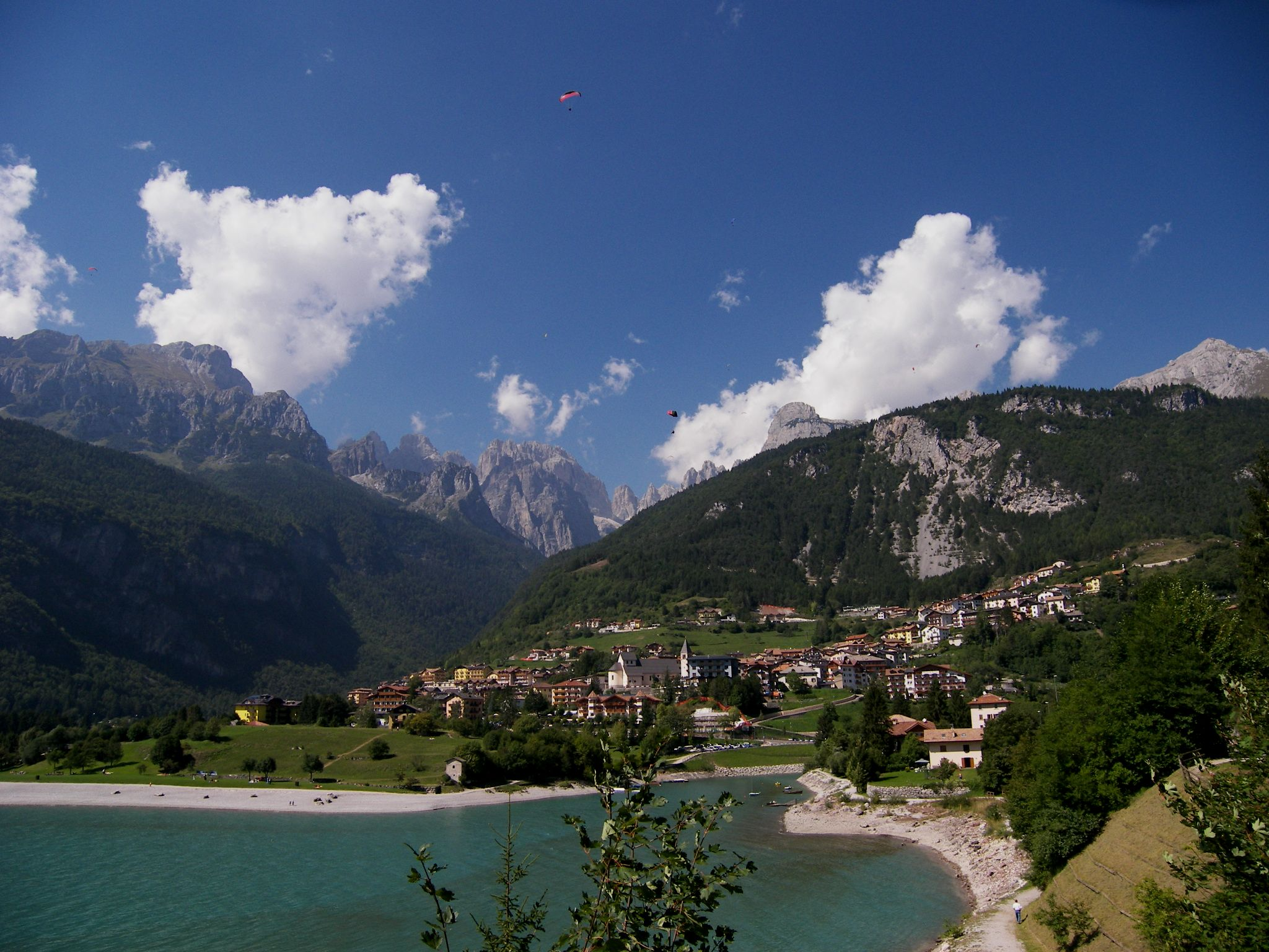 Molveno, Trentino, Italy